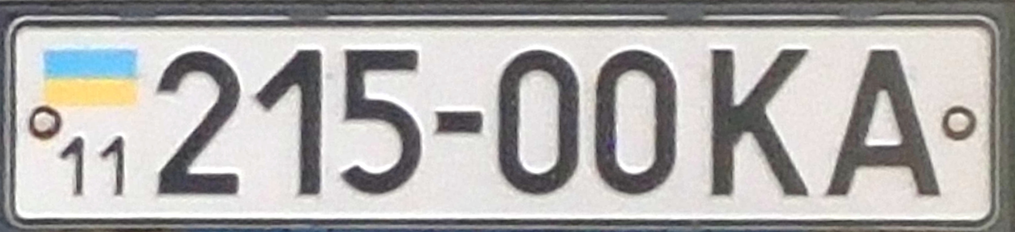 Oude plaat van de Oekraine